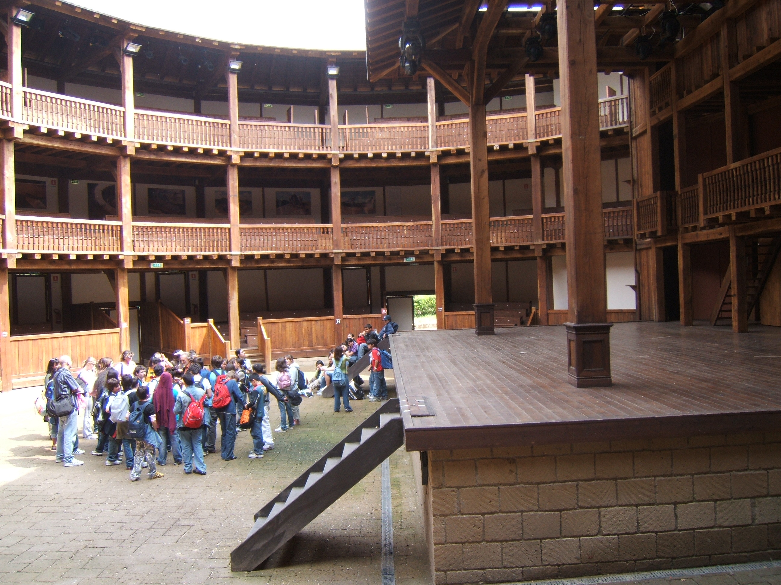 Roma, Villa Borghese, Ricostruzione in legno del Globe Theatre a Roma (Silvano Toti Globe Theatre)